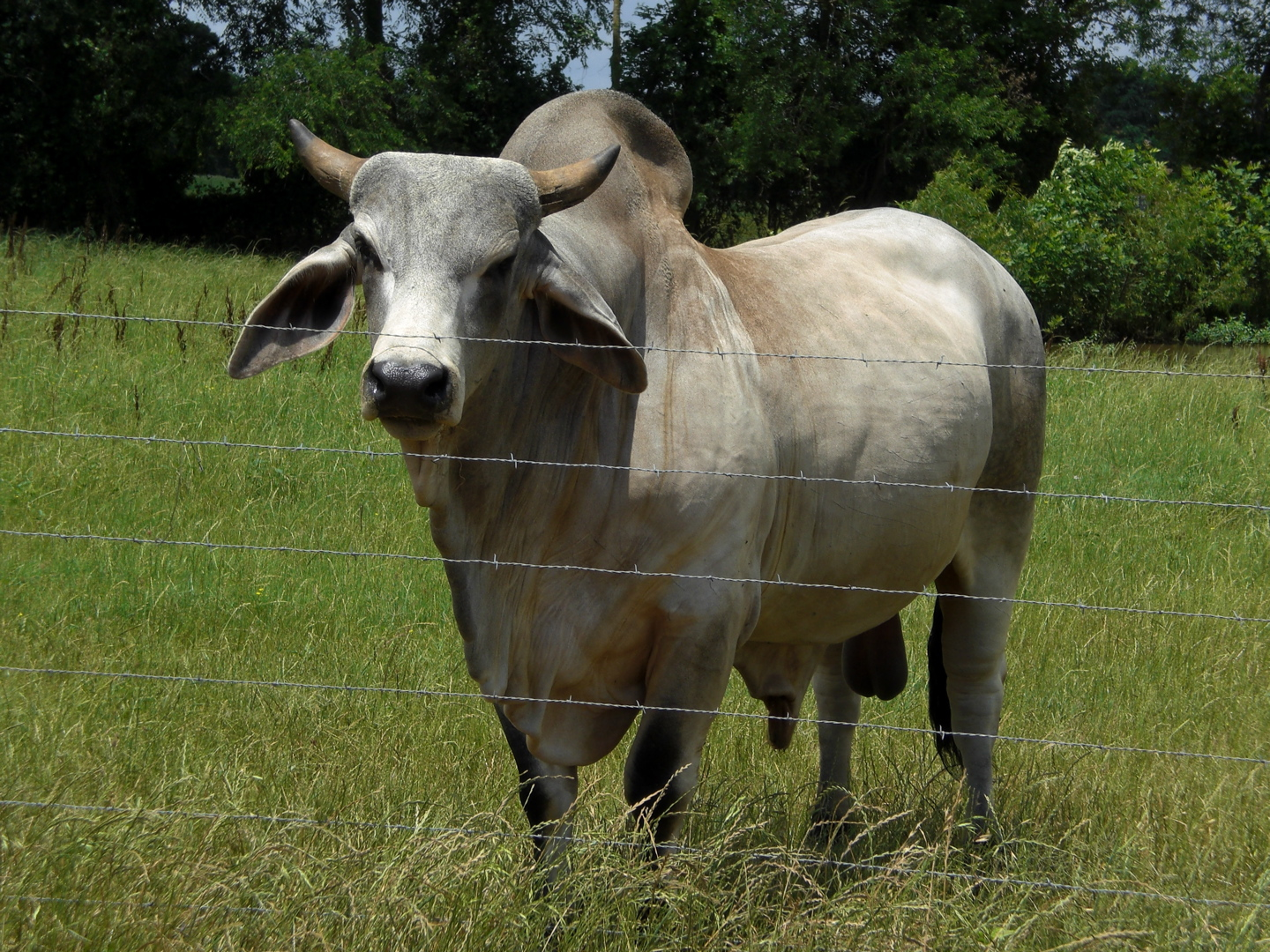 A zebu bull.